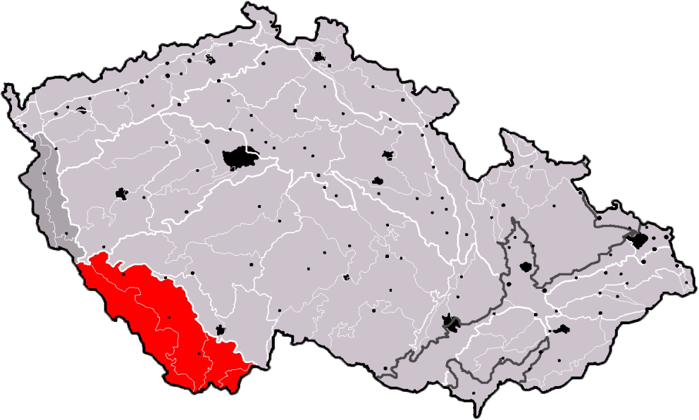 Poloha geomorfologické oblasti Šumavská hornatina v rámci České republiky. Hercynský systém Hercynská pohoří I Česká vysočina I1 (I) Šumavská subprovincie I1B (IB) Šumavská hornatina